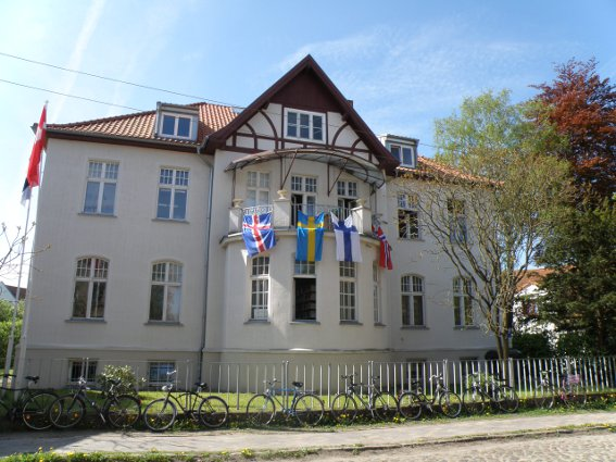 Gebäude der Nordischen Abteilung der Ernst-Moritz-Arndt-Universität Greifswald